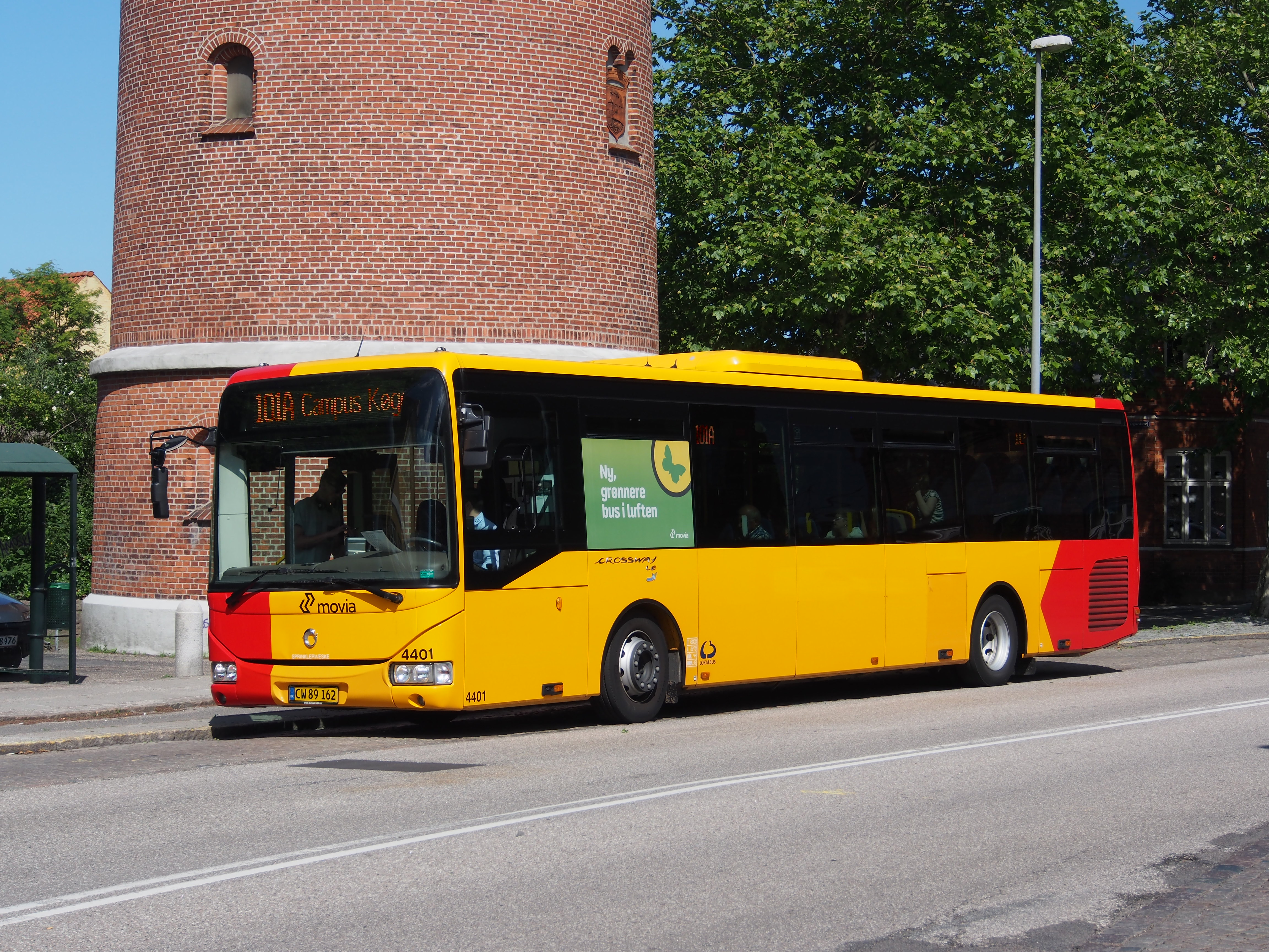 Photographed in Koge, Denmark.